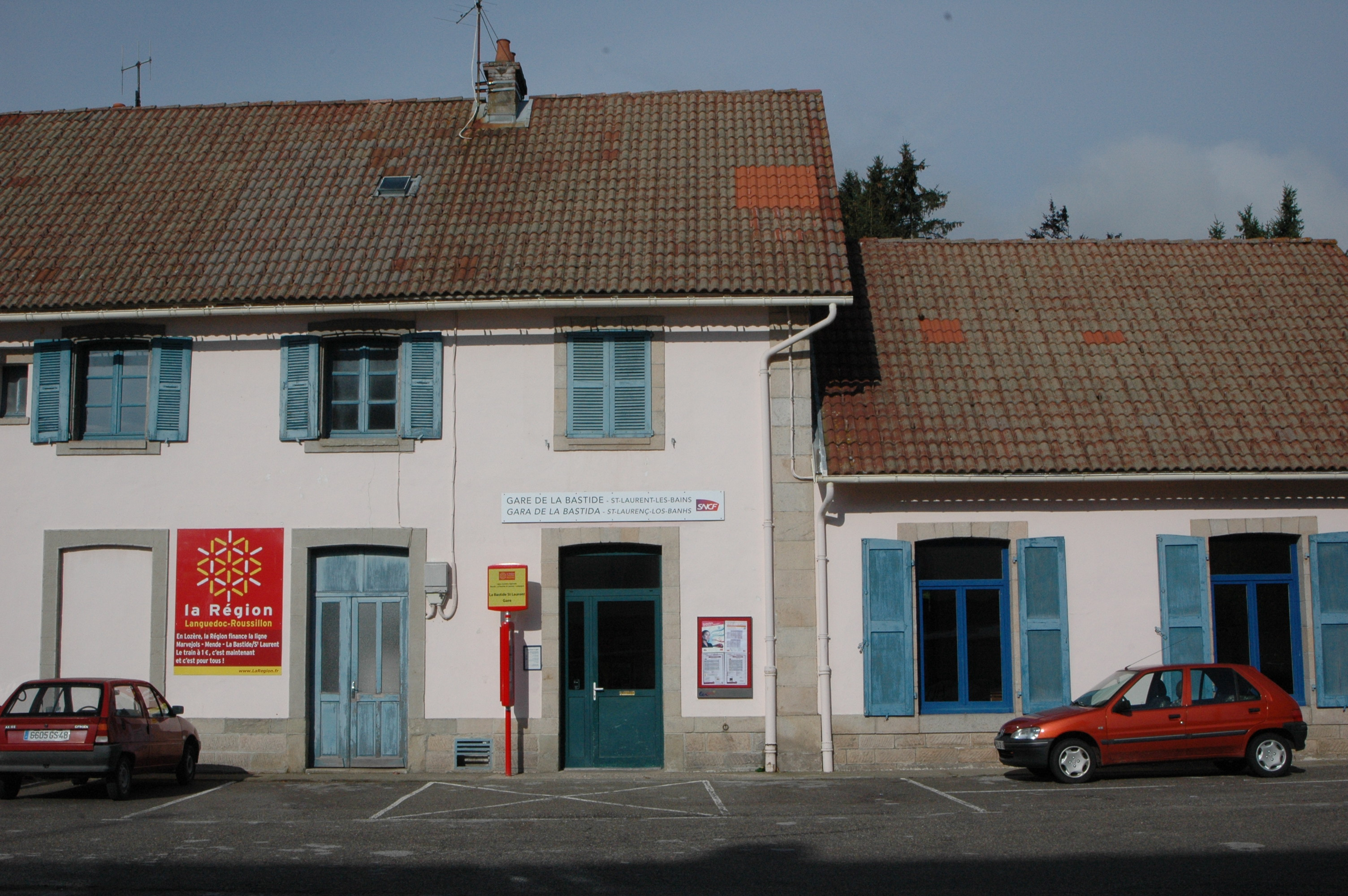 Gare Bastide